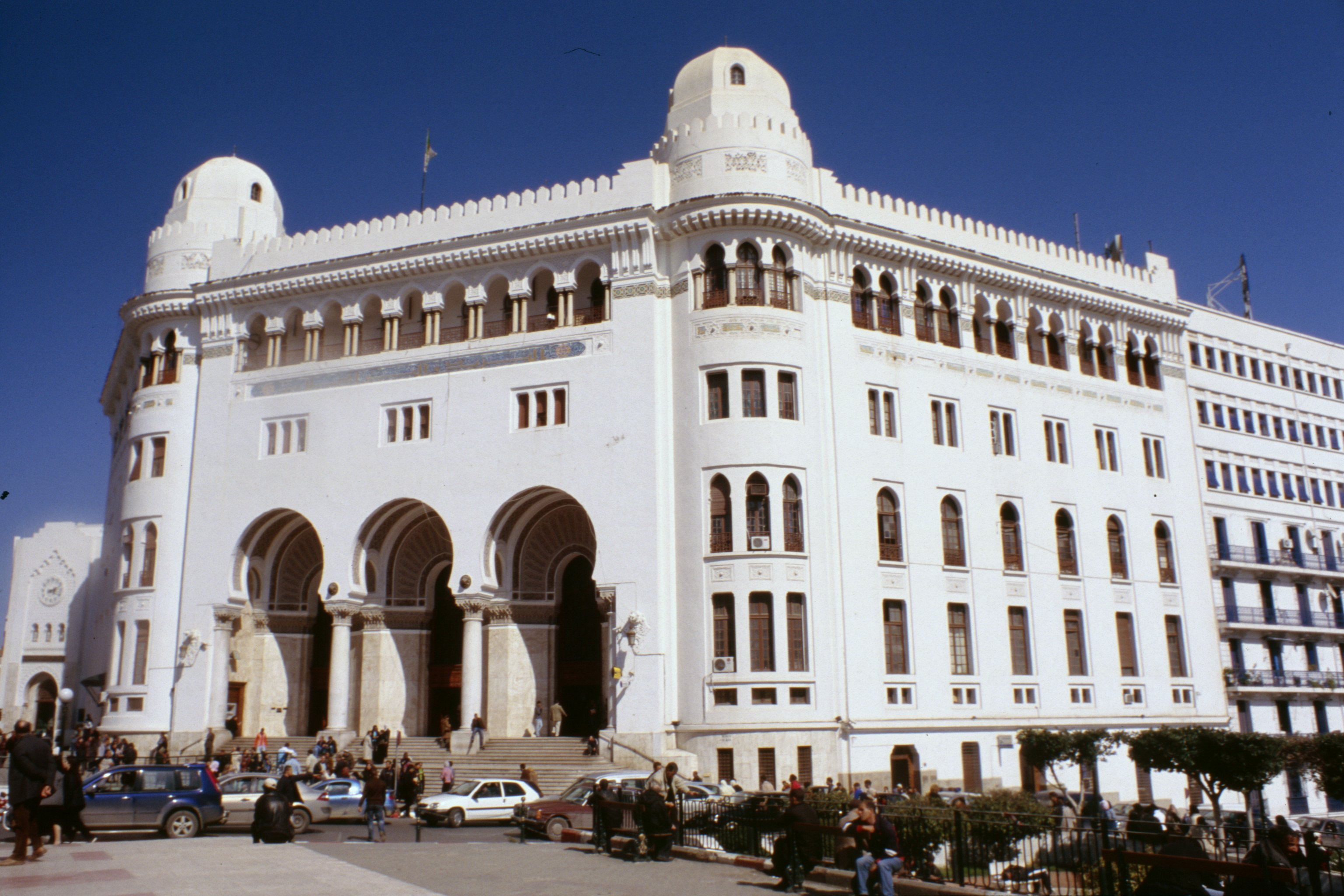 La Grande Poste d'Alger (Algérie).